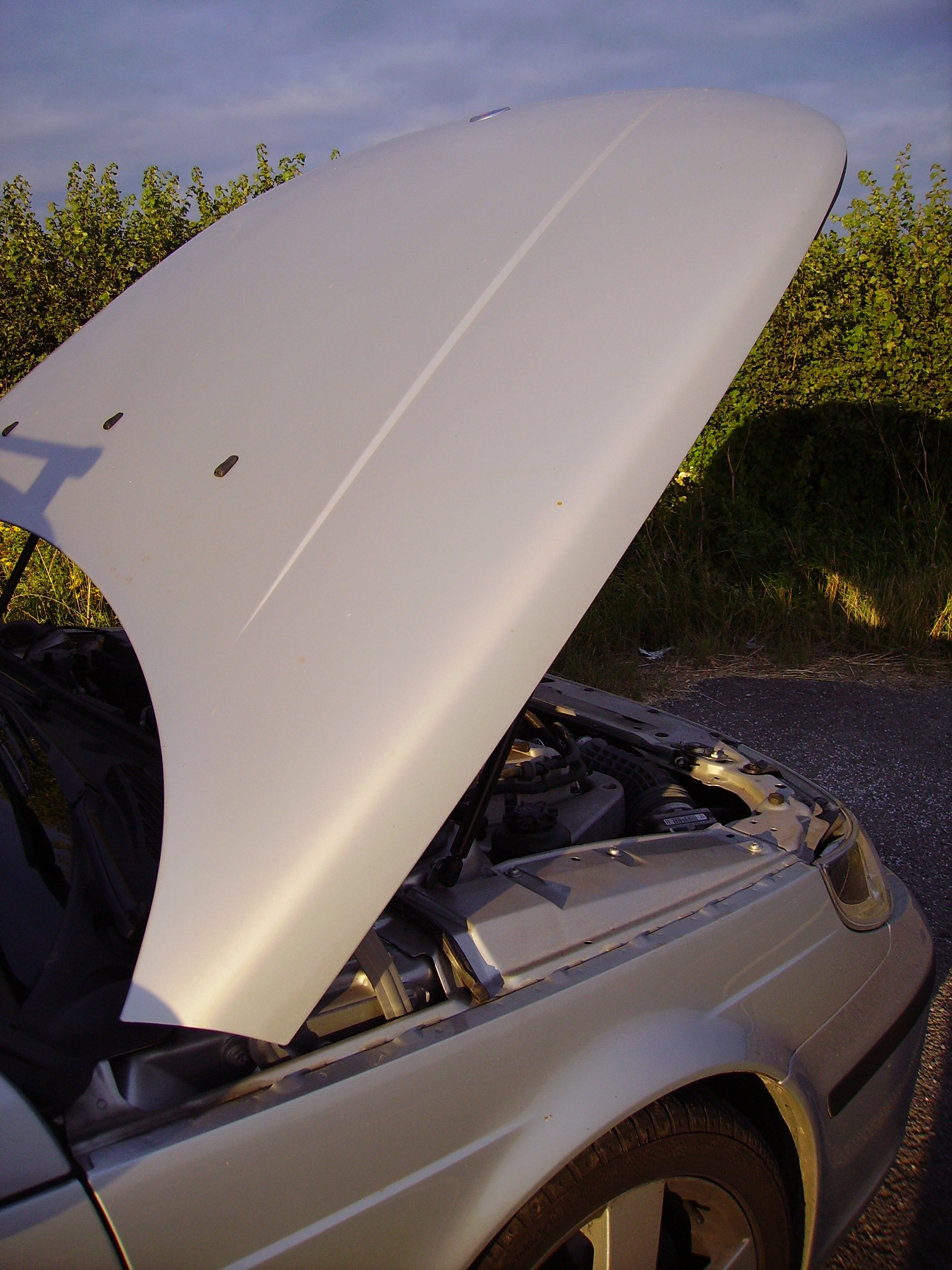 Bonnet raised on a Saab 9-5